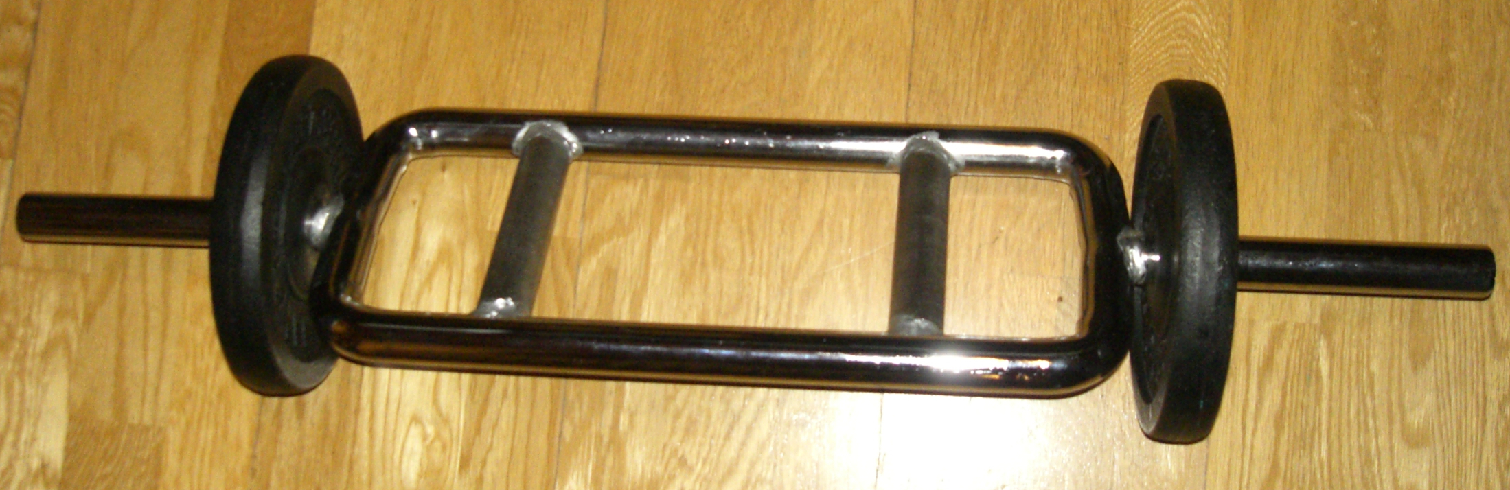 Eine Hantelstange speziell für die Trizeps-Muskelpartie.